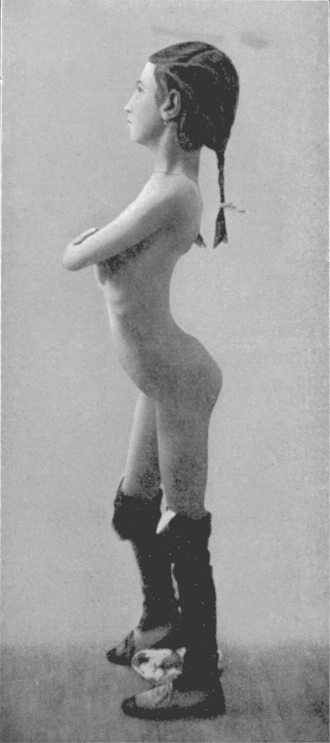 Ou bien le dos rond, la cyphose, c'est-à-dire à convexité postérieure.